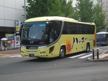 ハッコートラベルが運行する高速バス「ハッコーライナー」